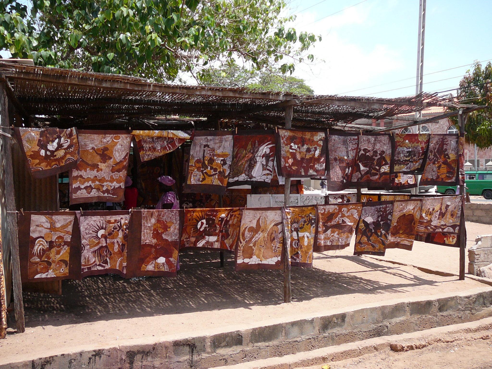 Shop in Bakau